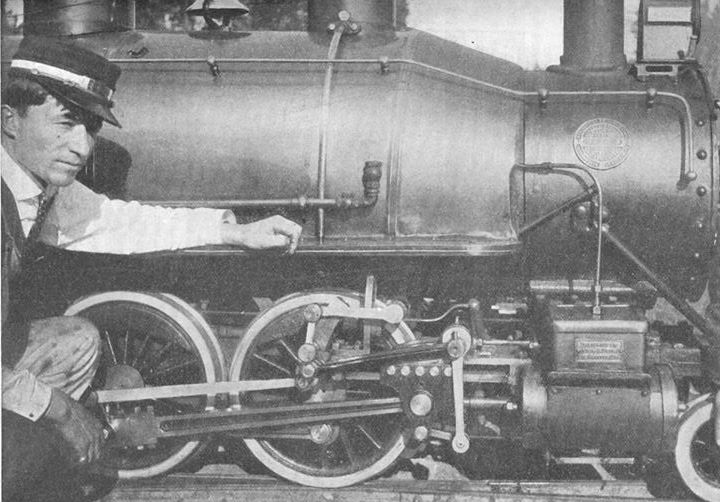 Arthur W. Line: Model Railways - XIX. - Eastlake Park Scenic Railway, Los Angeles, California. The Model Engineer and Electrician, 23 April 1908. Pages 395-399. Cropped and rotated version.